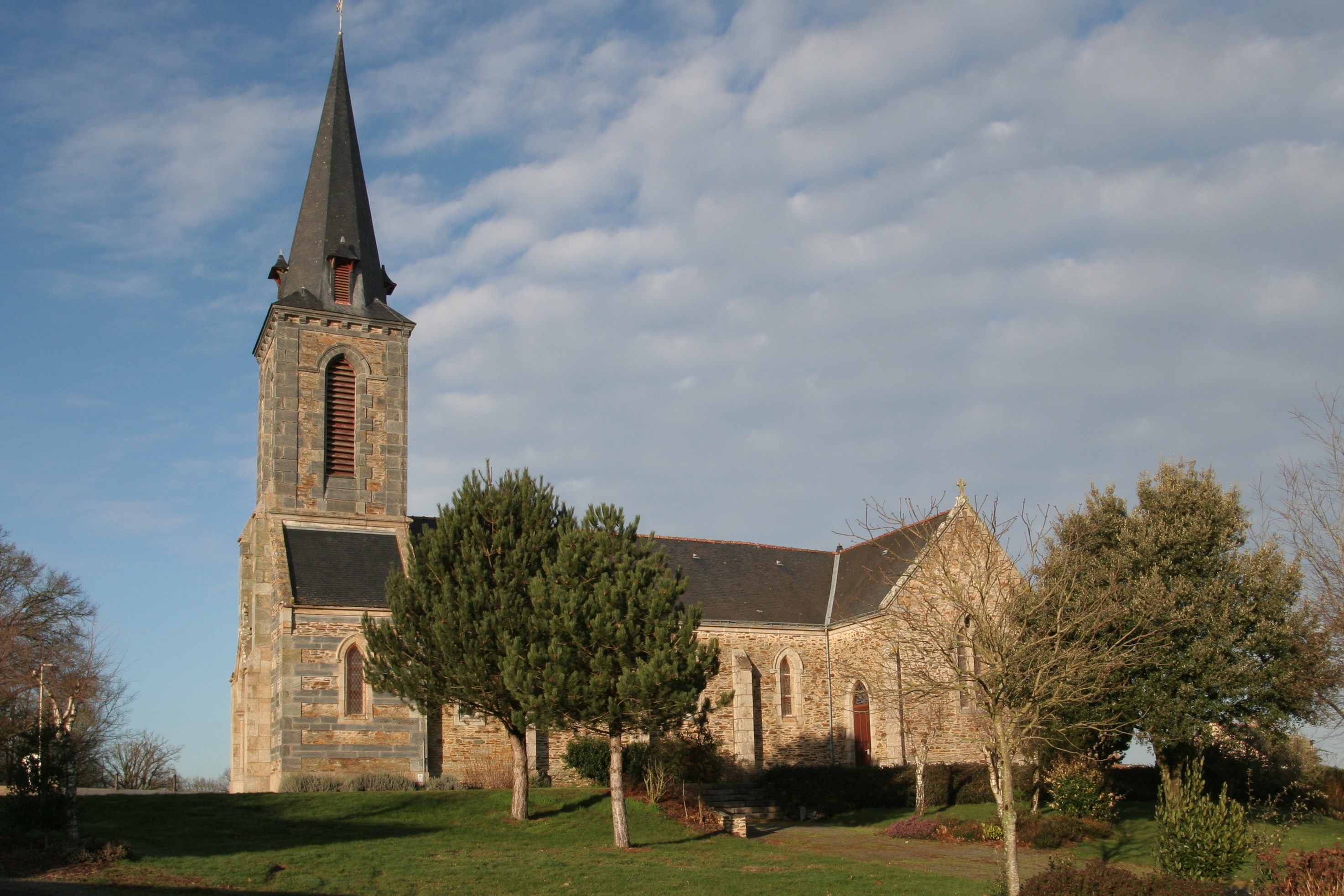 Église Saint-François-de-Sales à Quelneuc.